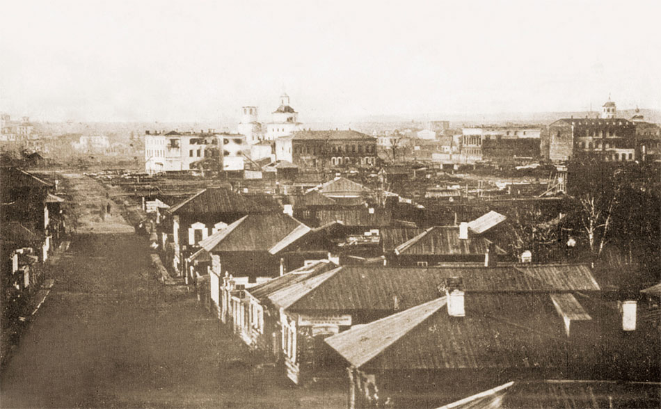 г. Иркутск. После пожара 1879 года. Собрание НБ ИГУ. Видна 3-я Солдатская улица. Вдали – обгоревшие Чудотворская и Тихвинская церкви, правее – уцелевшая Спасская церковь. На Большой улице стоят выгоревшие каменные дома Пахолкова, Жбанова, Громовой и гостиницы «Деко»